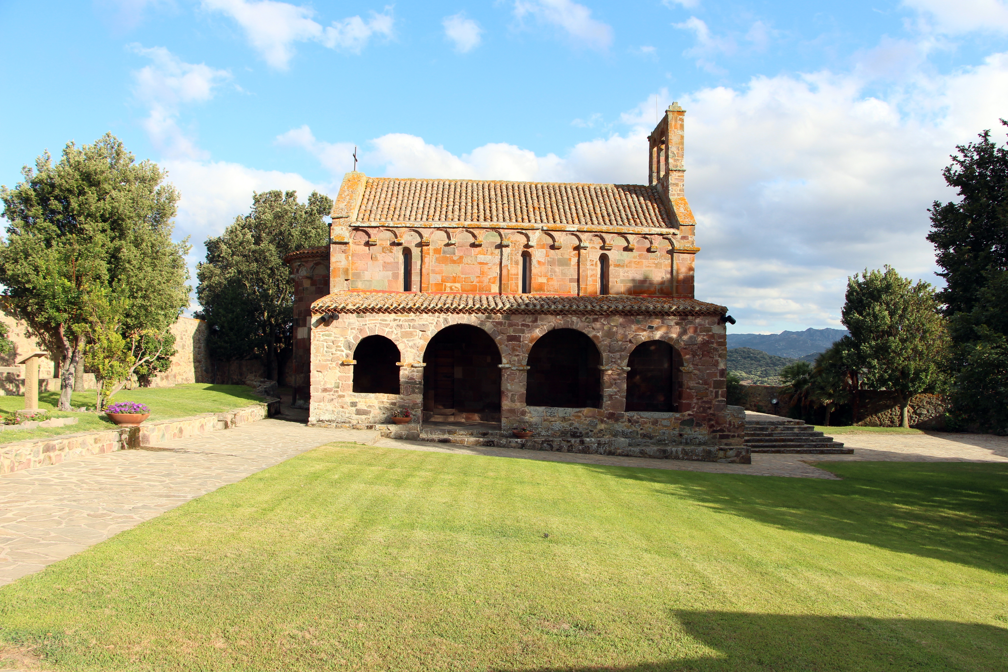 Oschiri